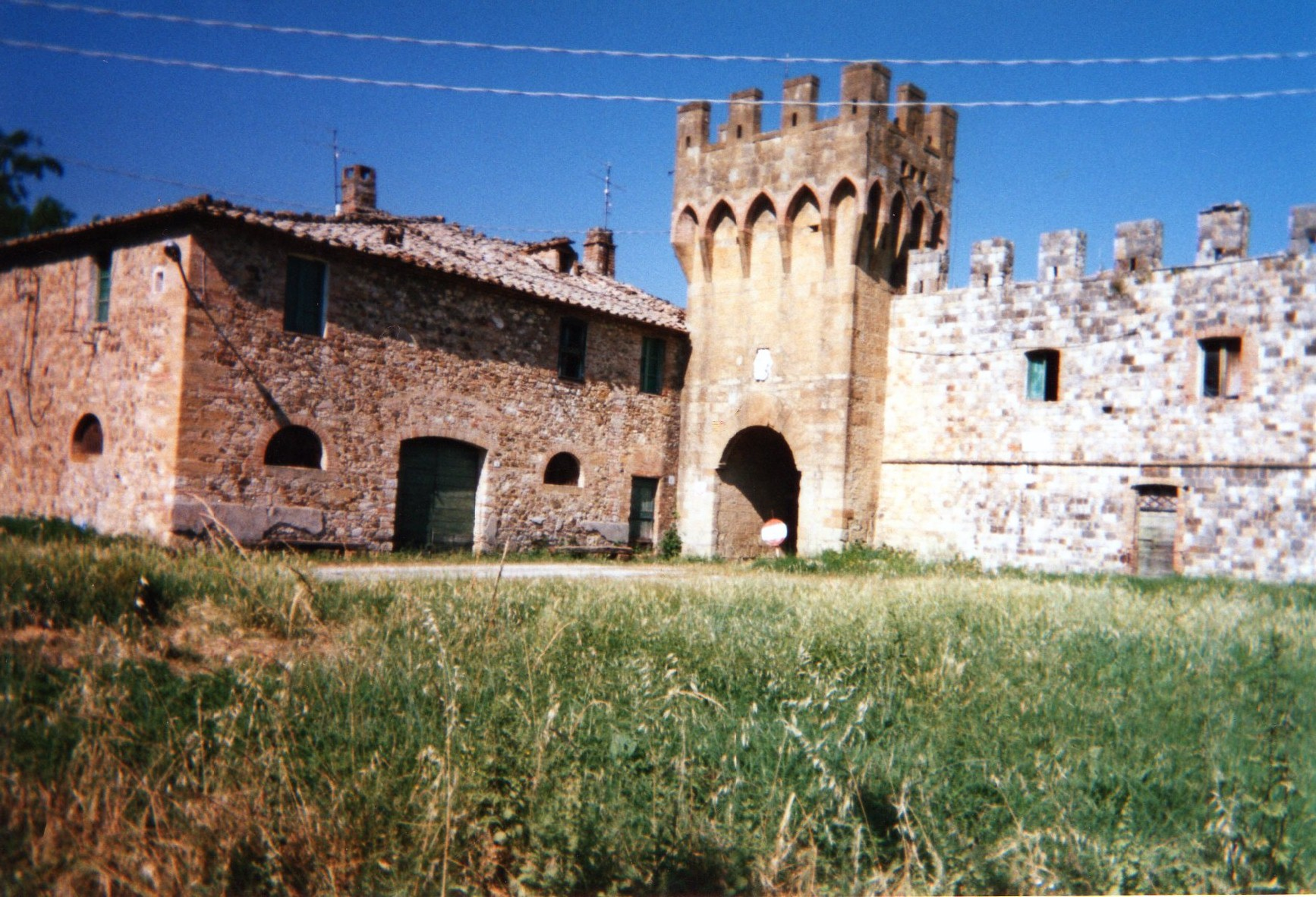 Borgo medioevale di Salci (Città della Pieve, PG)